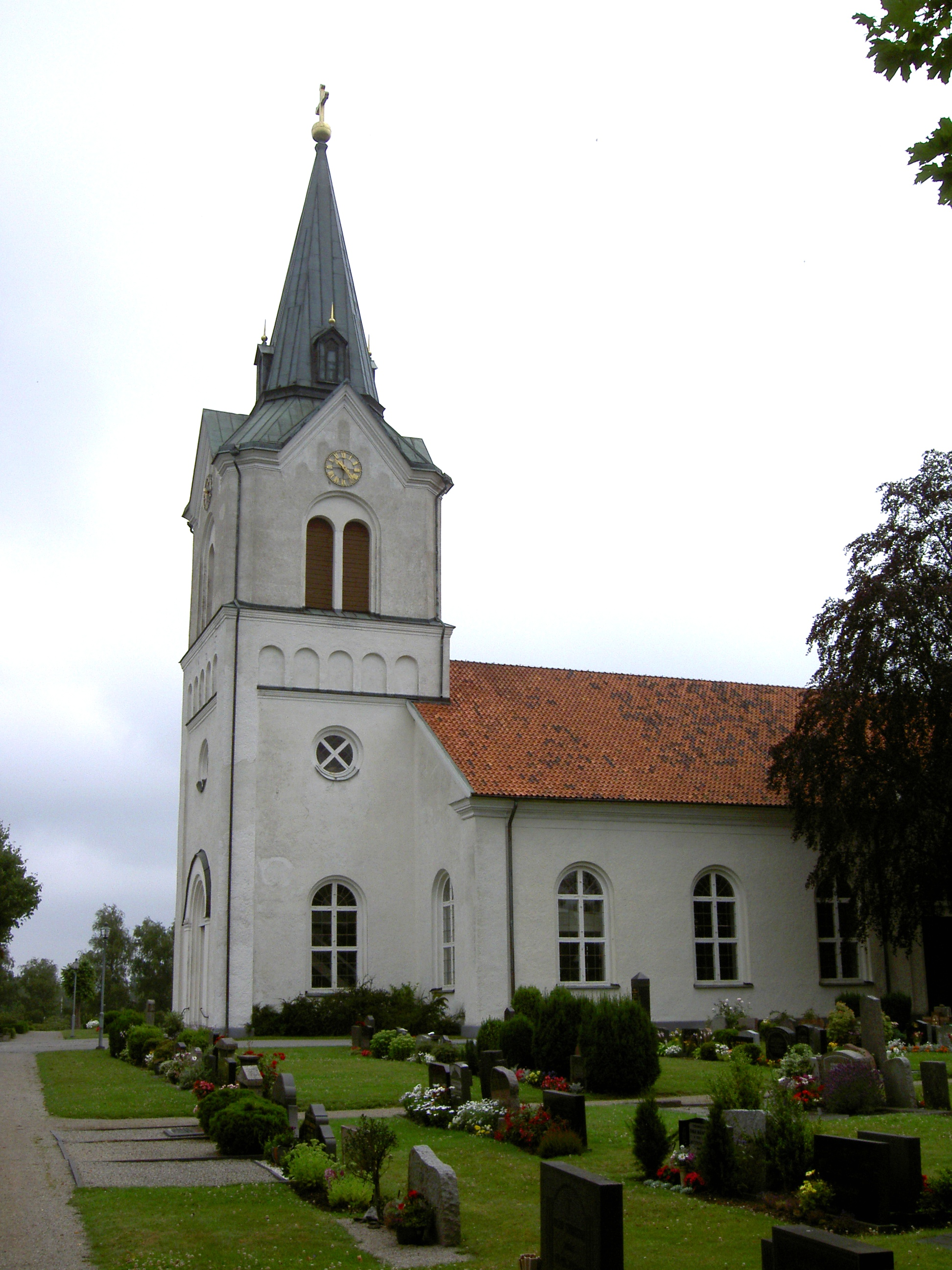 Kyrkhults kyrka